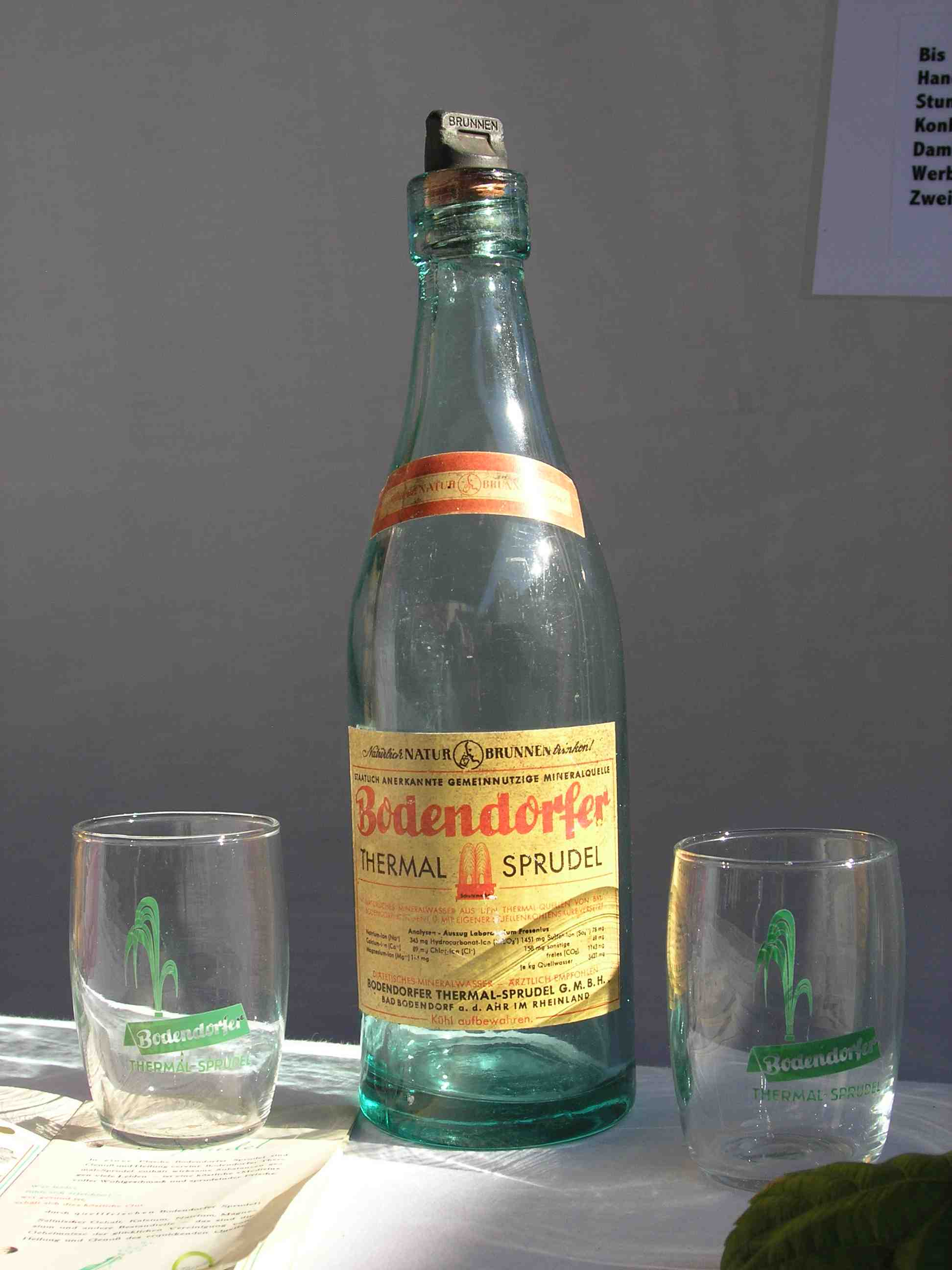 In diese Flaschen wurde das Bodendorfer Wasser in den 1950er Jahren abgefüllt